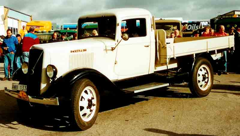 Volvo LV76 Truck 1936